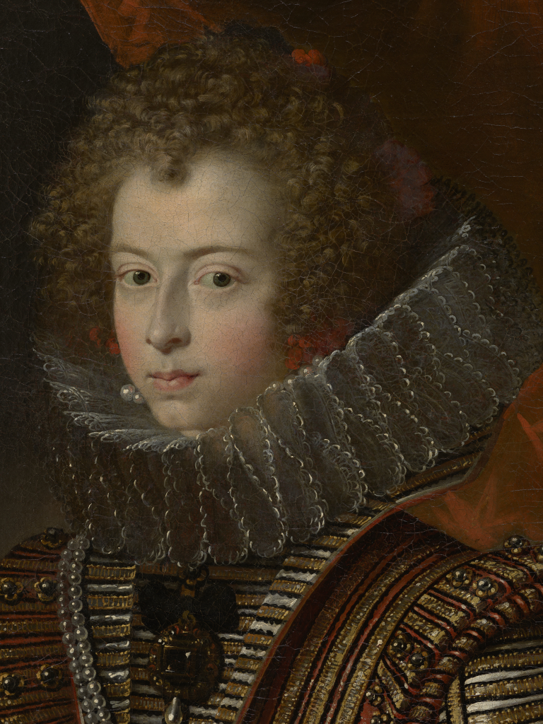 Detalle del retrato de la infanta María Ana de Austria pintado por el pintor Felipe Diriksen (también conocido como Felipe Diricksen o Deriksen, según firmaba sus cuadros). Realizado el año 1630 y conservado en el Portland Art Museum.